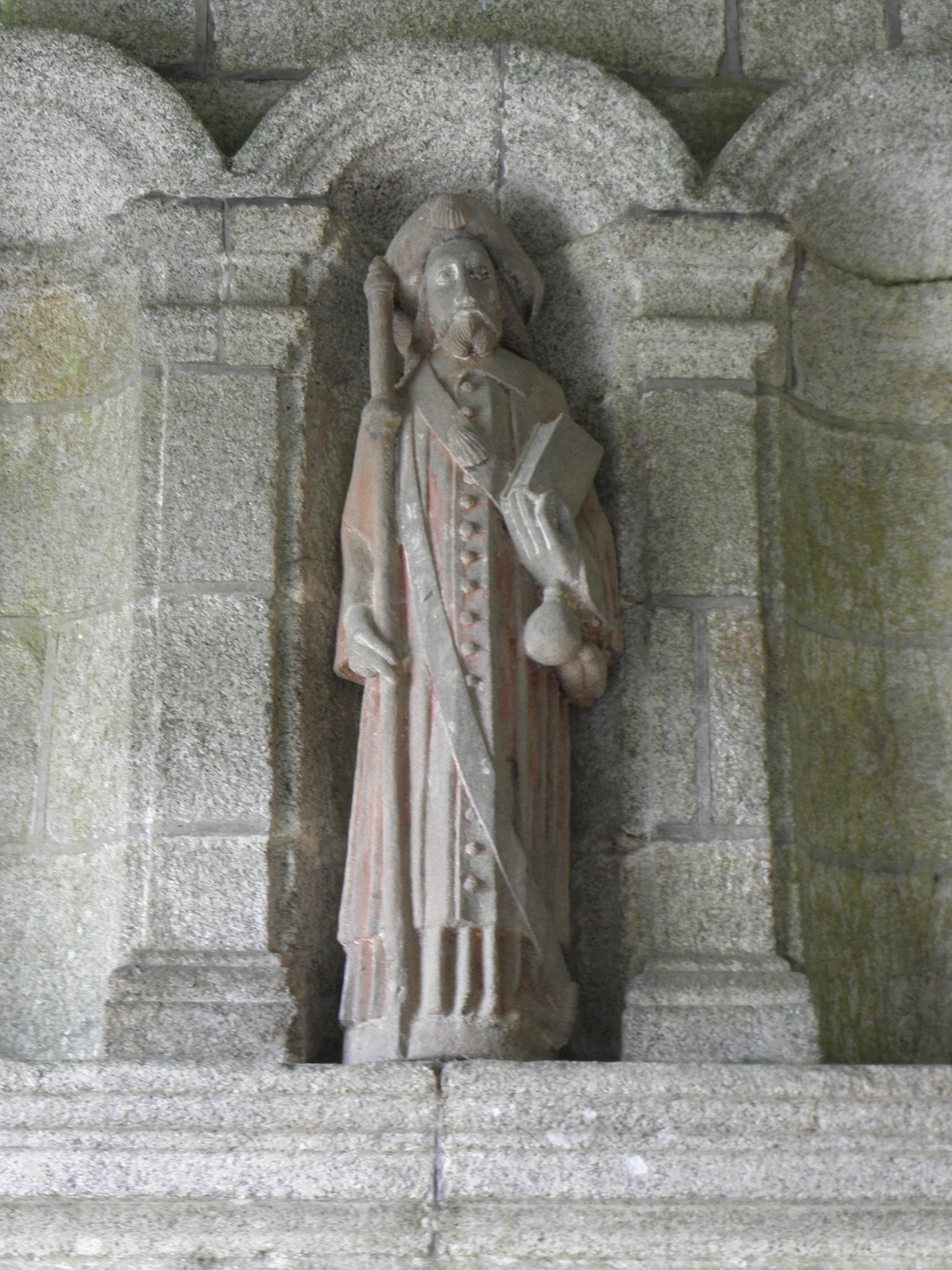 Saint-Jacques-le-Majeur. Statue du porche méridional de l'église Saint-Pierre de Plougourvest (29).